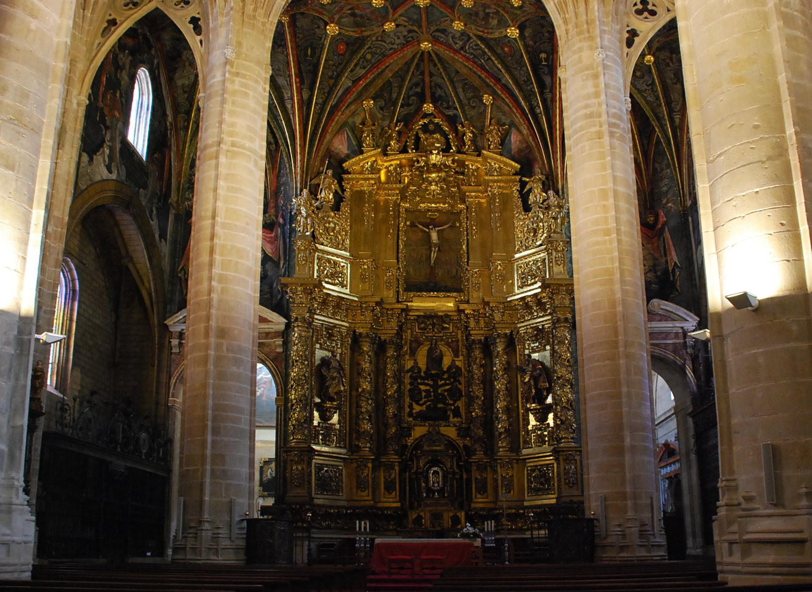 Retablo de la Concatedral de Santa María de la Redonda, en Logroño (La Rioja - España).